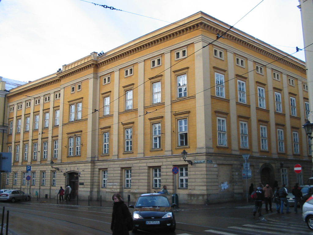 Gmach PAT